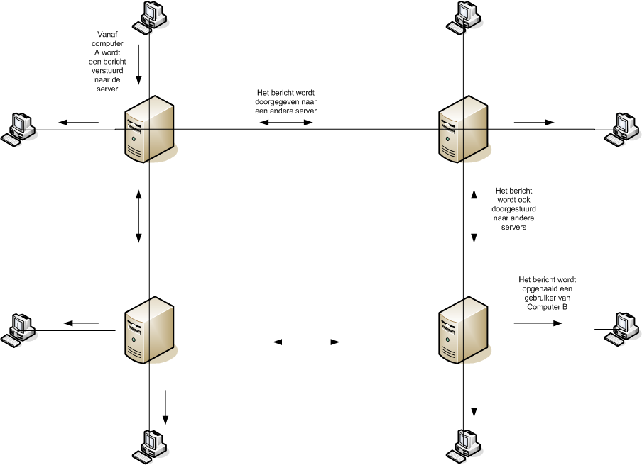 Omdat ik op internet geen geschikt Nederlandstalig schema van een aantal Usenetservers en clients kon vinden, heb ik er zelf maar eentje gemaakt.